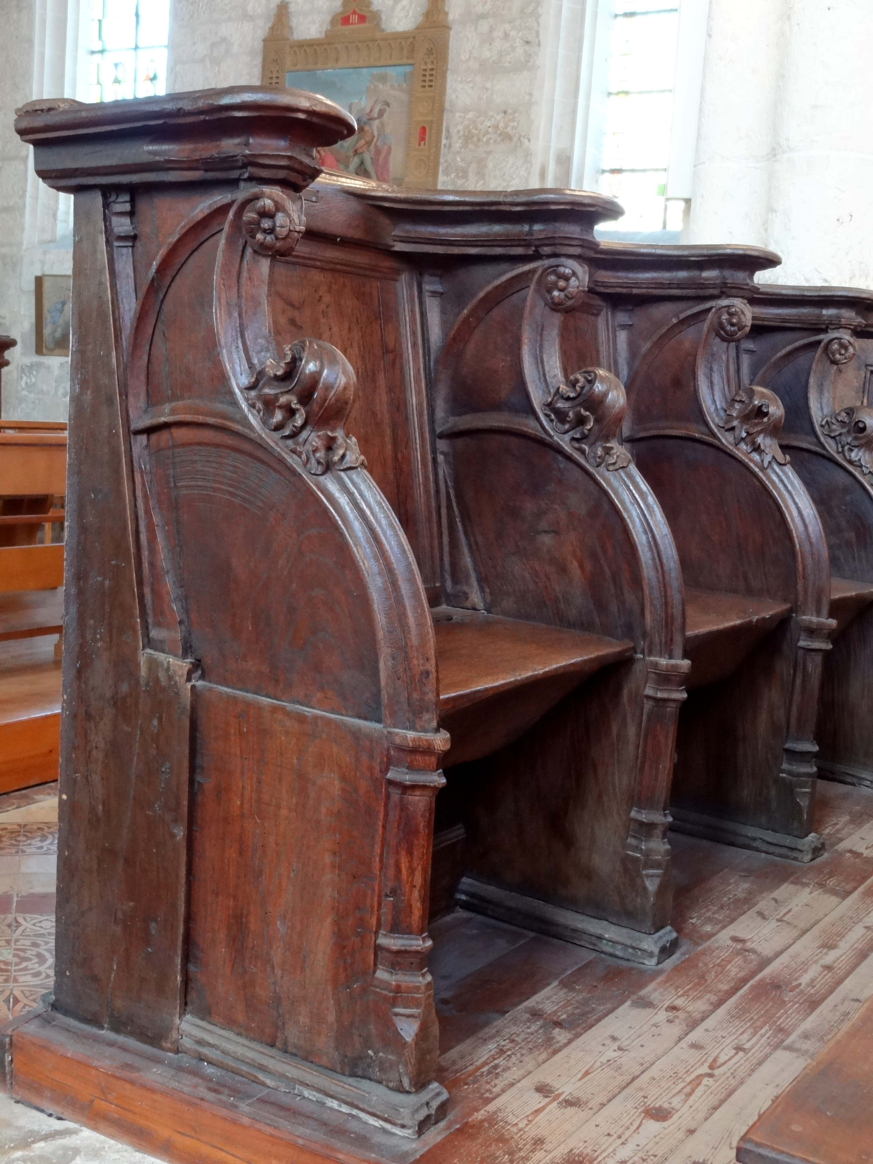 Stalles côté nord.